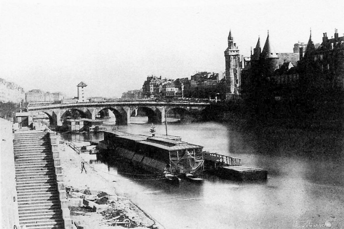 Bateau-lavoir sur la Seine à Paris. Vers le pont au Change